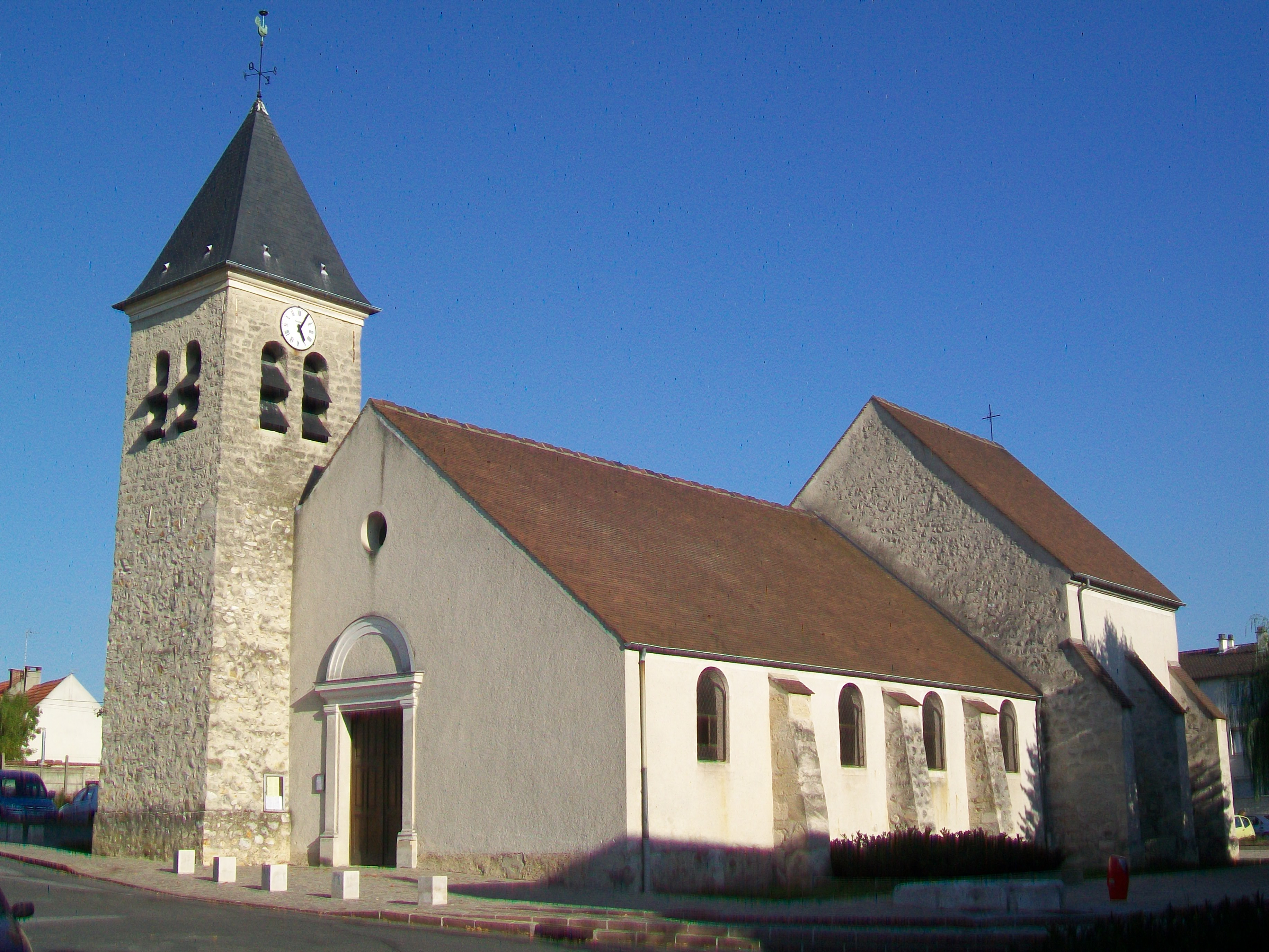 L'église Saint-Nicolas de Frépillon.